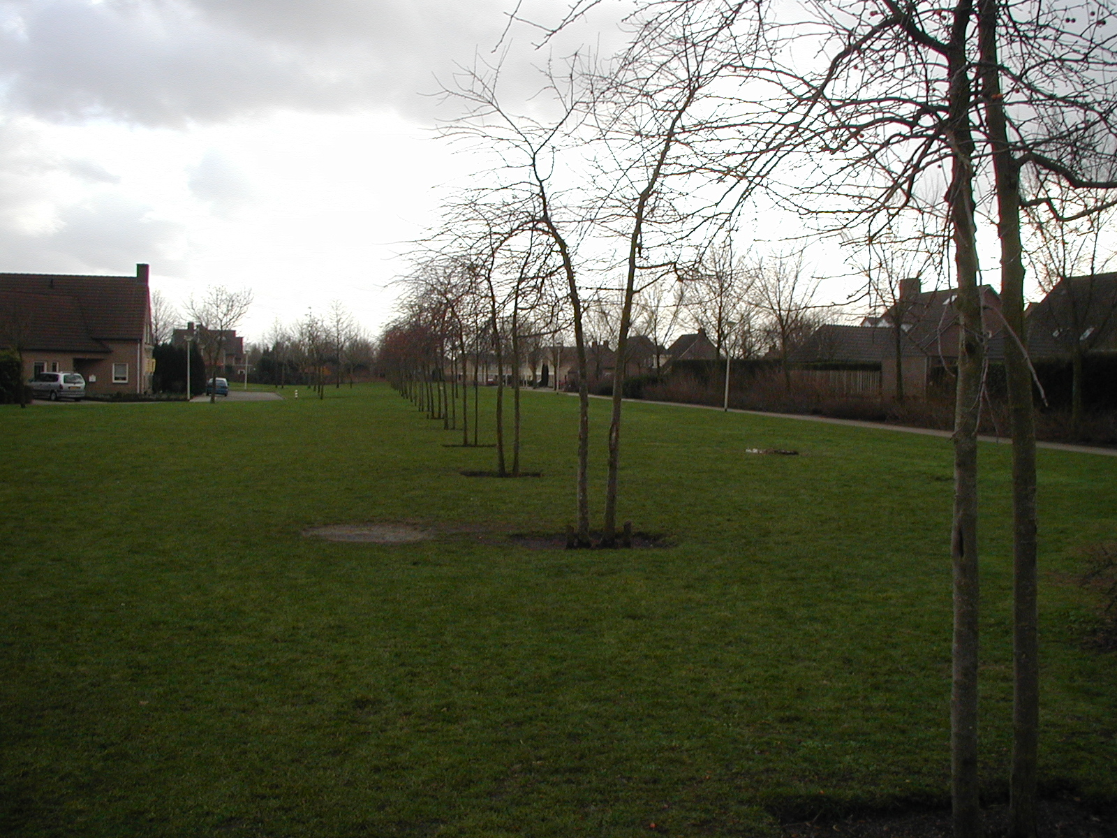 Markering van de Peelrandbreuk met een park en bomenrij in de wijk Heiakker. Foto zelf gemaakt op 1 februari 2004. Keunen.